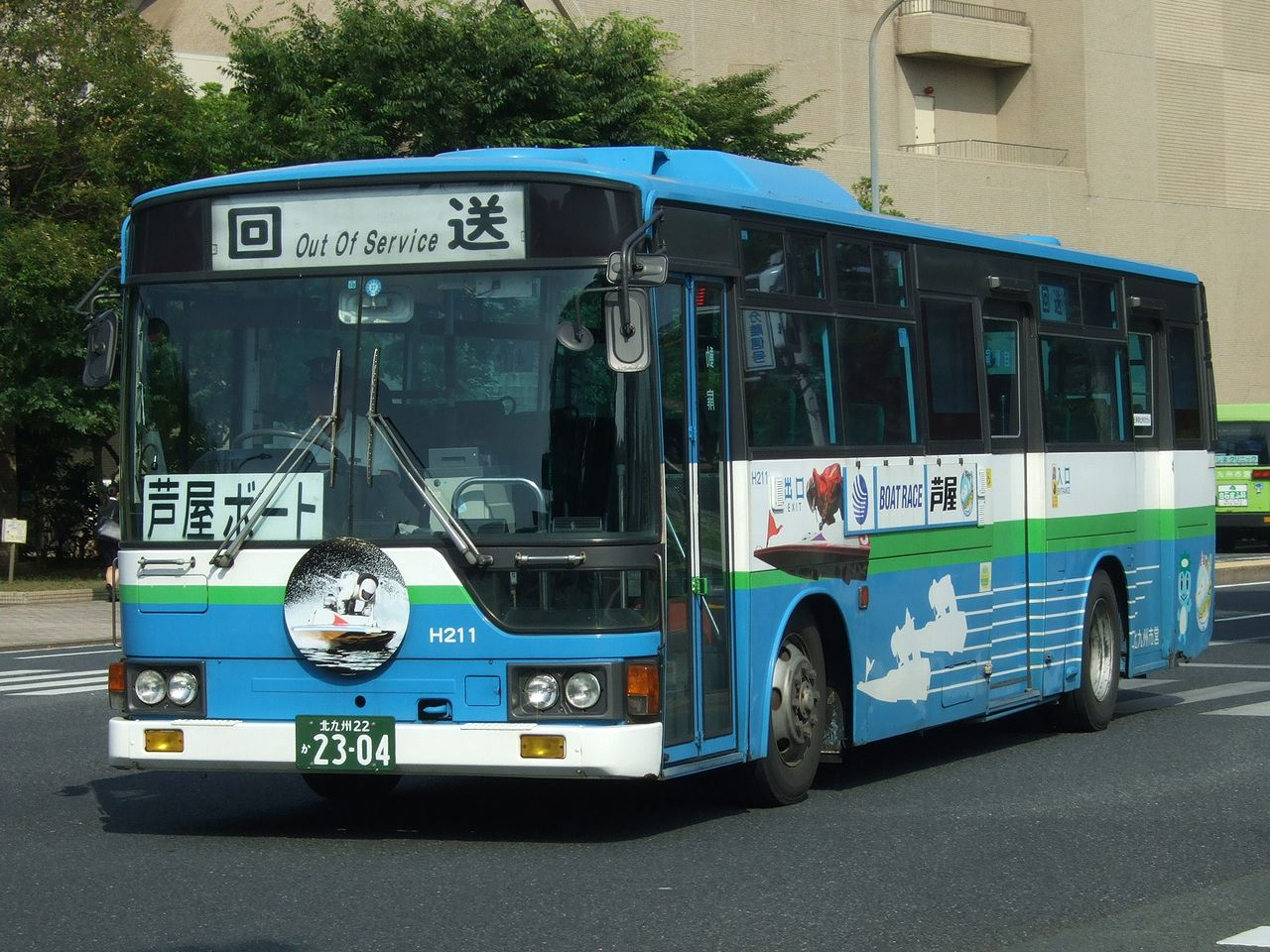 北九州市営バスのボート送迎バス用車両